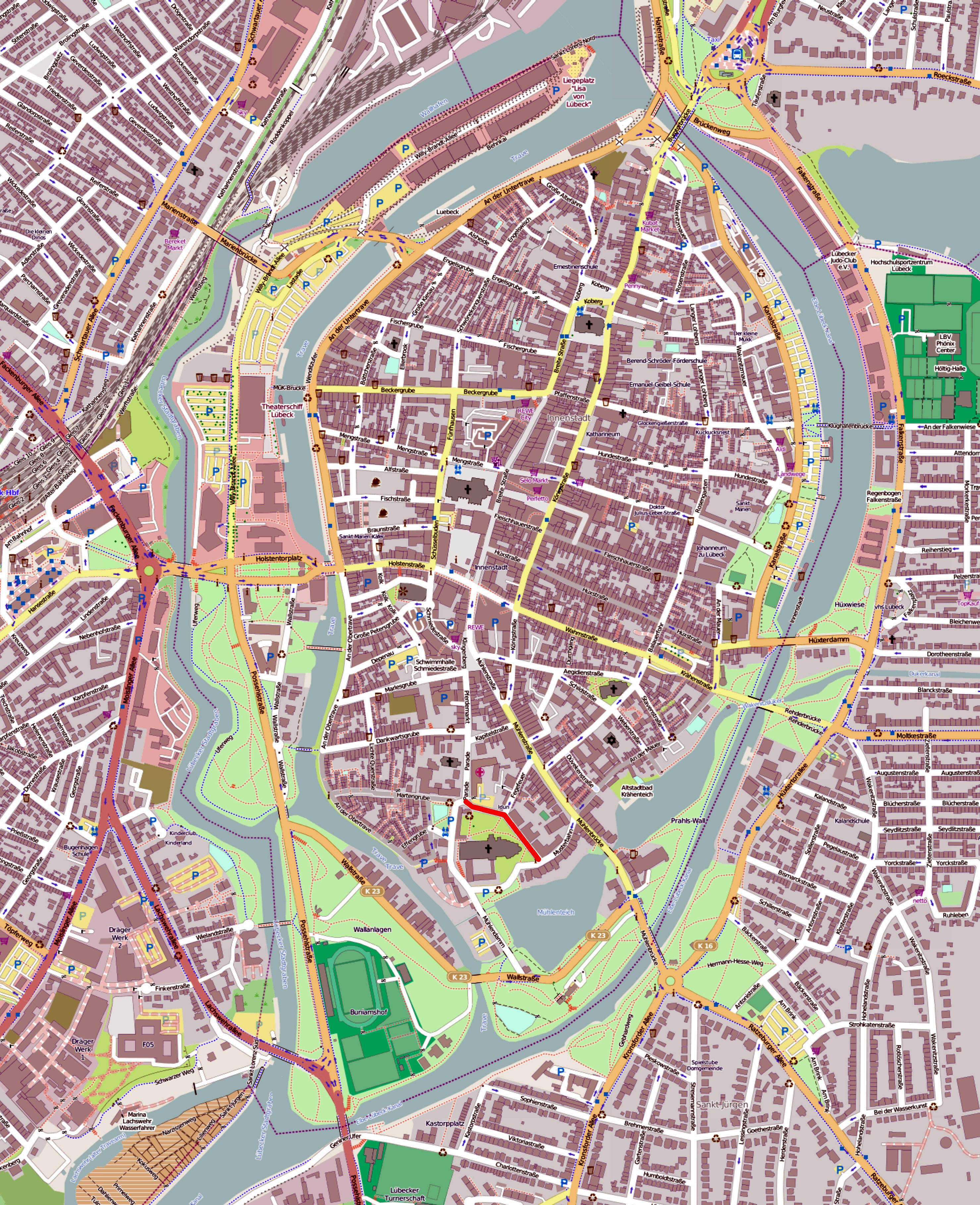 Der Domkirchhof in Lübeck, rot markiert auf einer OpenStreetMap-Karte